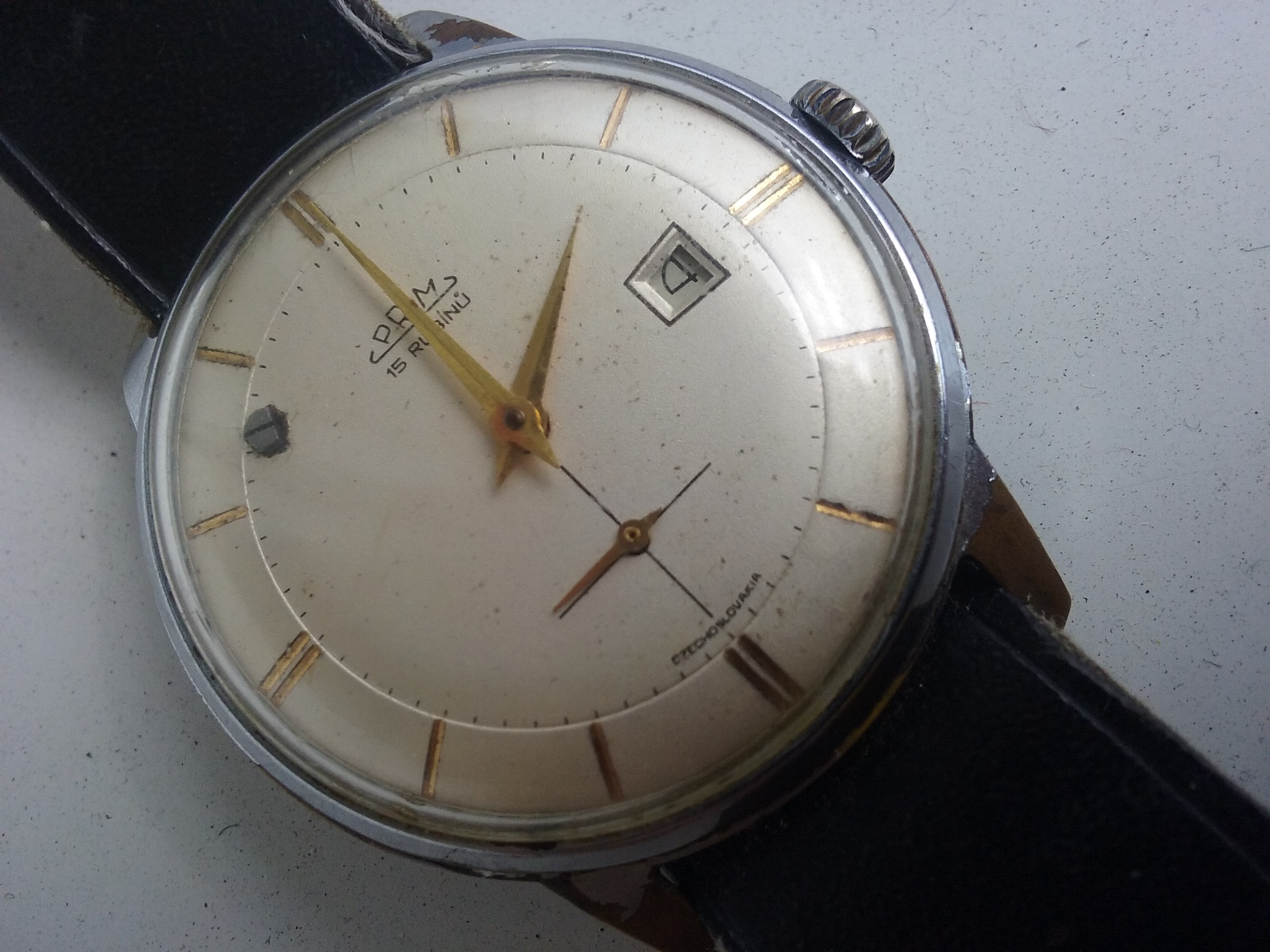 Hodinky Prim 15 rubínů